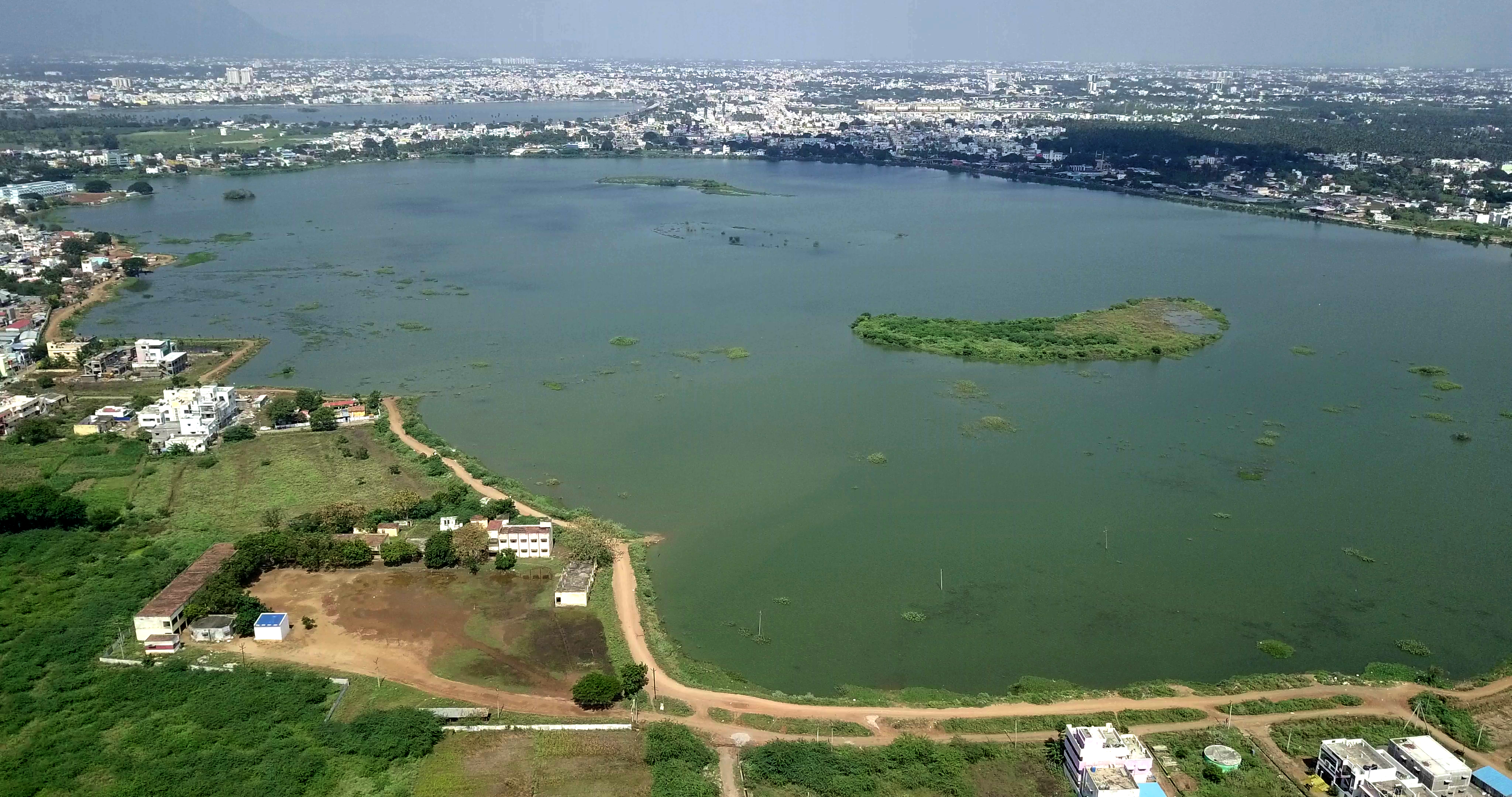 கோவை குறிச்சிக்குளம்